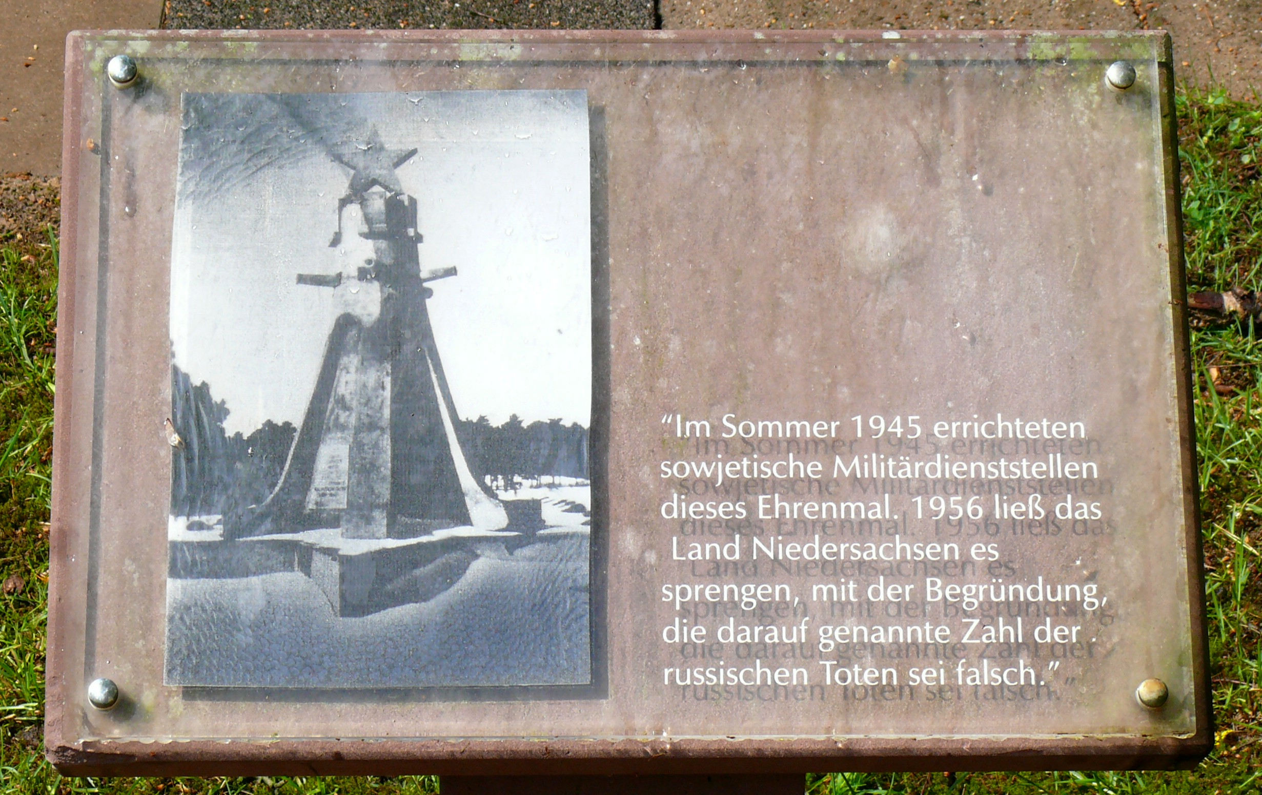 Gedenkstätte Stalag X B Sandbostel / Lagerfriedhof / Foto des gesprengten sowjetischen Ehrenmals